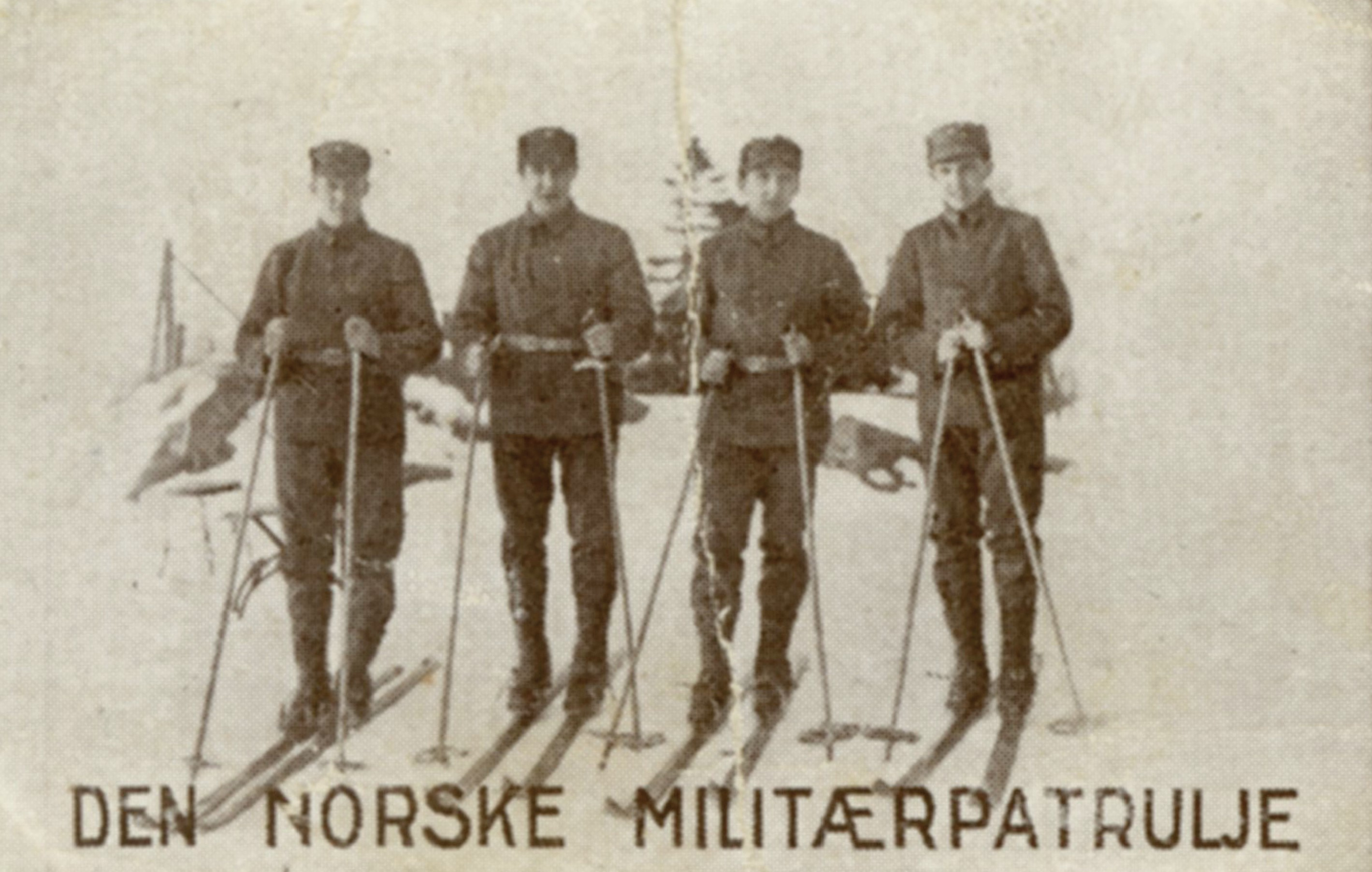 Format: Samlekort Dato / Date: 1930 (fotografiet), ca. 1930 (dokumentet) Fotograf / Photographer: Ukjent Wikipedia: Militært patruljeløp Eier / Owner Institution: Trondheim byarkiv, The Municipal Archives of Trondheim Arkivreferanse / Archive reference: Sportsklubben Freidig: Sigarettfoto ca. 1930 (Løpenr. 75) F23907 Tekst på baksiden: Den norske militærpatrulje som så overlegent vant Vinteridrettsukens første konkurranse både i langrennet og i skytning. Fra høire: patruljens fører løitnant Knut Lunde, soldat M. P. Vangli, soldat Oscar Aas-Haugen og sersjant Leif Skagnes (sistnevnte var også med i vår seierrike patrulje i St. Moritz i 1928). Det norske lags tid for langrennet var ca. 8.30 minutt bedre enn annet lags. Merknad: Disse samlekortene med bilder av norske og internasjonale idretthelter fulgte med i sigarettpakker på 1920 og 30-tallet - derav tobakksreklamen på baksiden. Samlekortene kommer fra Sportsklubben Freidigs arkiv, og inneholder nærmere 90 unike kort pent plassert i et samlealbum. Samleren var den senere skipsmegler Finn Følling (1914 – 1985).